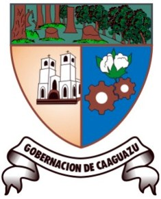 Este es escudo oficial del gobierno departamental